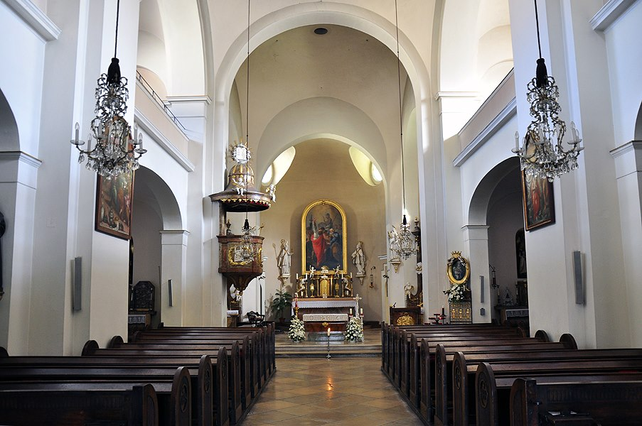 Innenansicht der Erberger Pfarrkirche, Wien